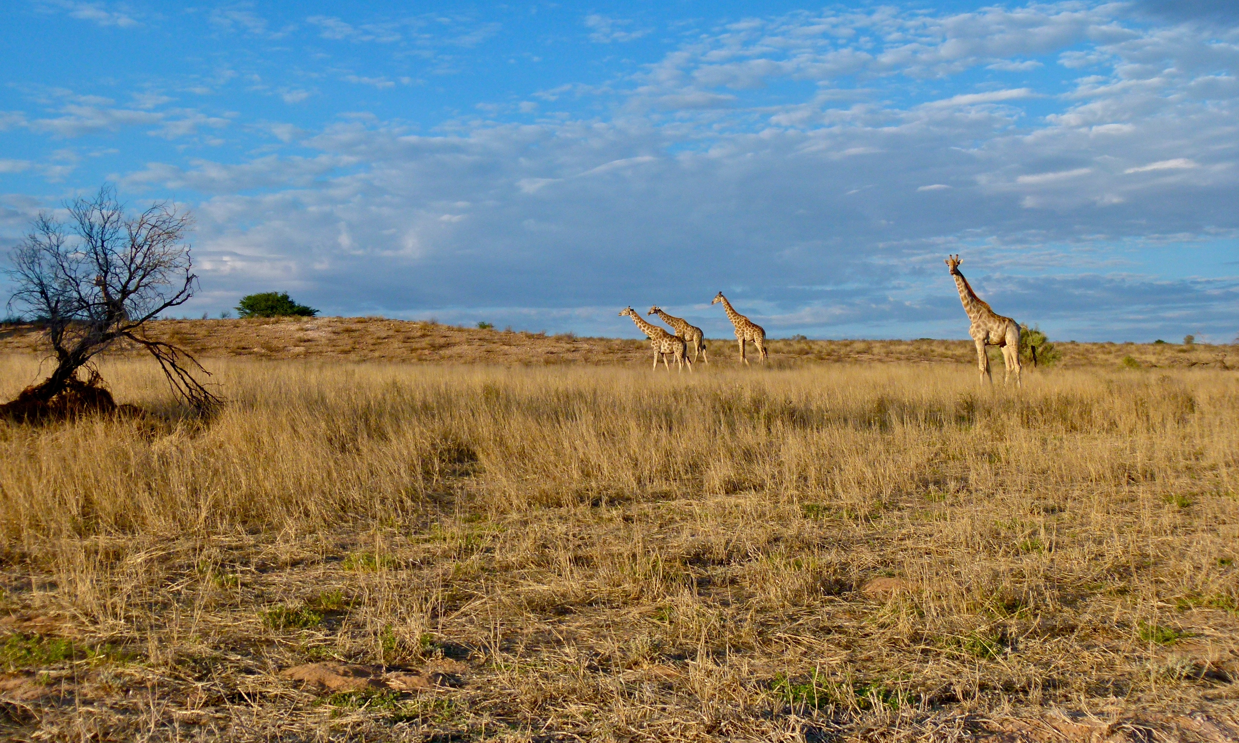 Auob Riverbed, Kgalagadi Transfrontier Park, SOUTH AFRICA